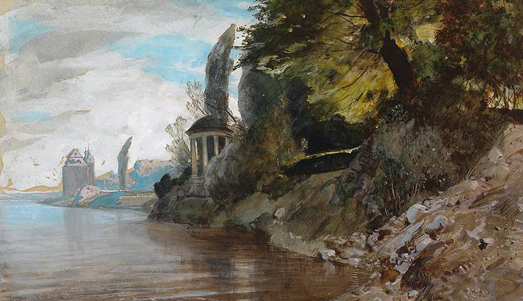 Lili-Tempel des Architekten Nicolas Alexandre Salins de Montfort (1753 in Versailles; † 1838 in Nantes), Offenbach am Main, Gouache. 23,5 x 40,5 cm